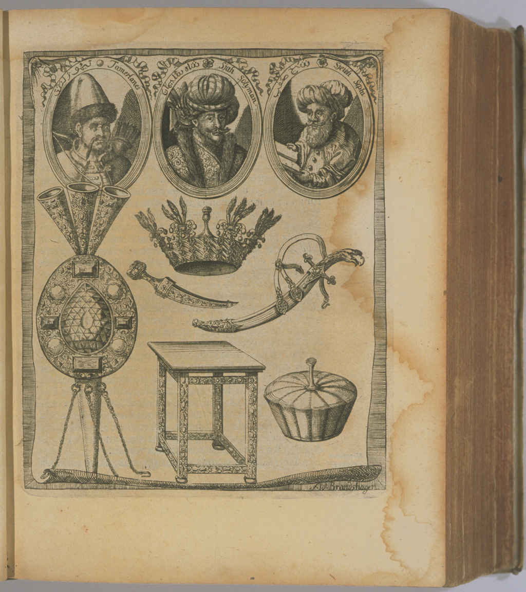 خط و نقاشی انگلبرت کمپفر سیاح آلمانی، تصویر شاه سلیمان و خط الرسم فارسی کمپفر